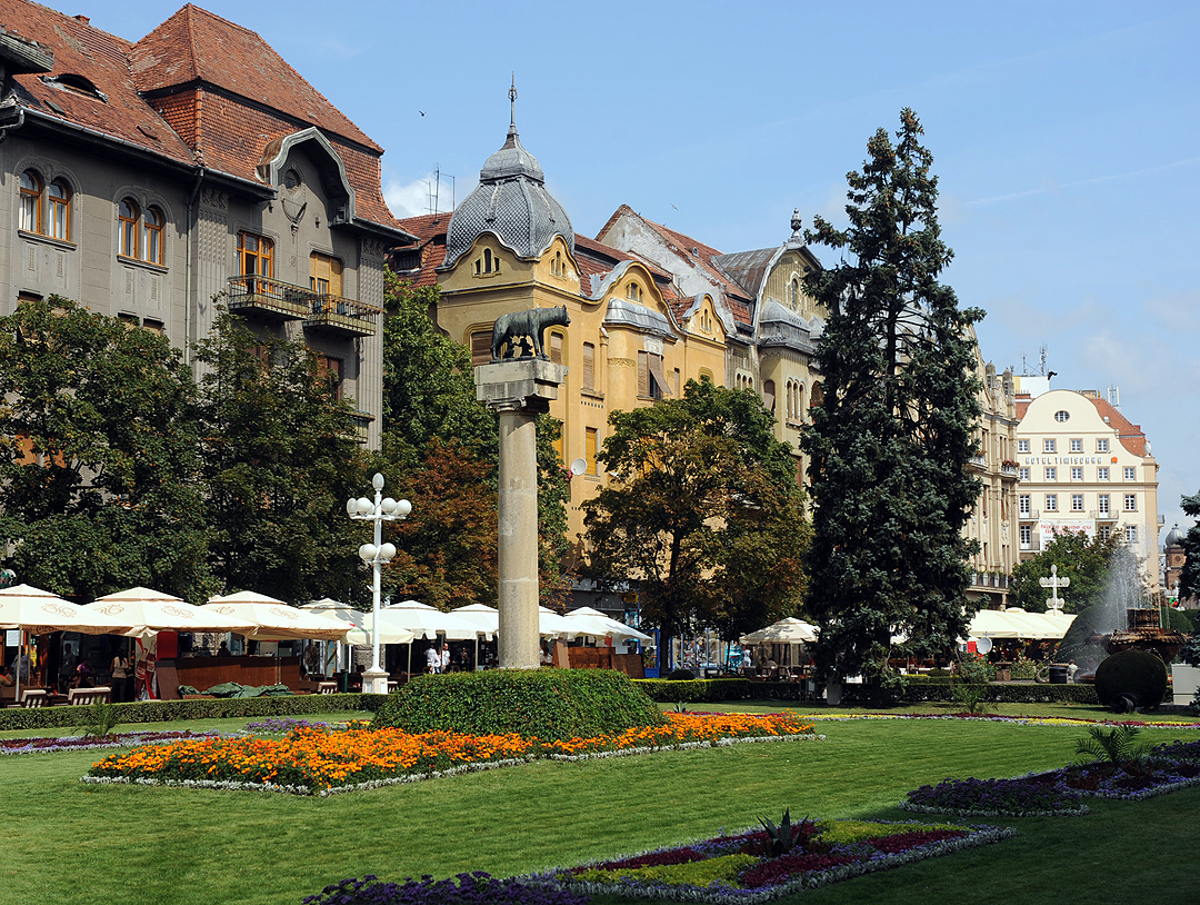 Lupoaica cu Romulus şi Remus